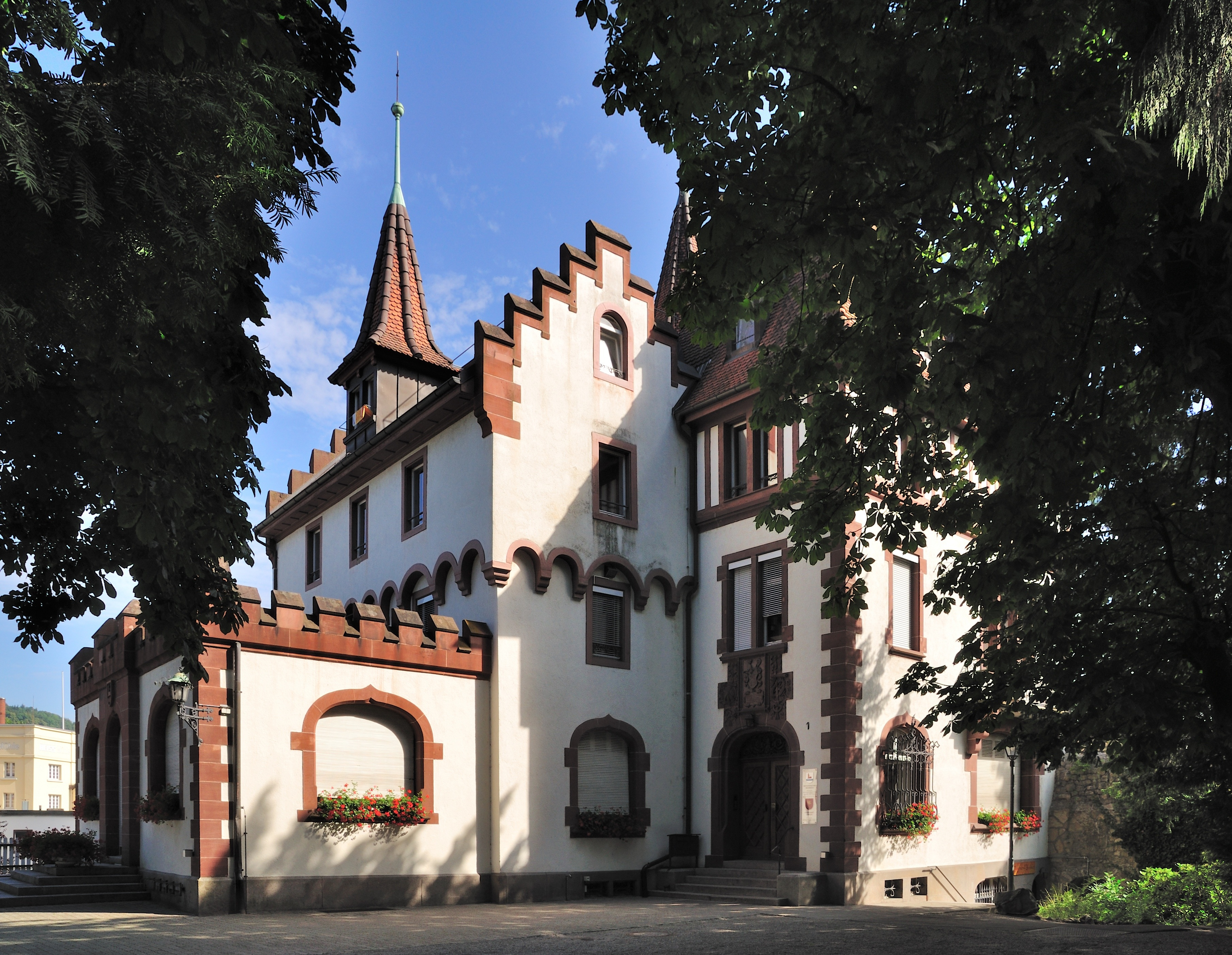 Lörrach-Brombach: Brombacher Schlösschen